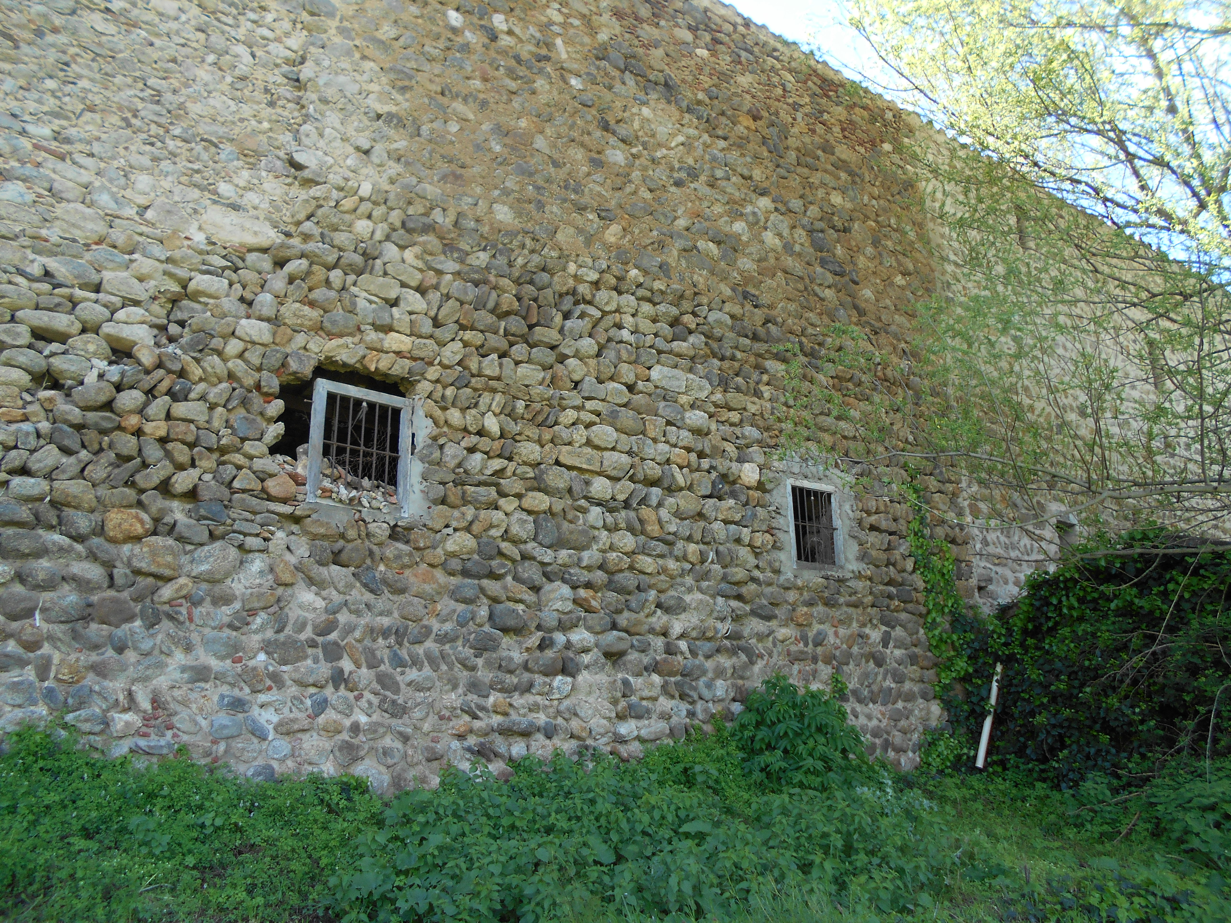 Muralla nord del Castell de Pujols